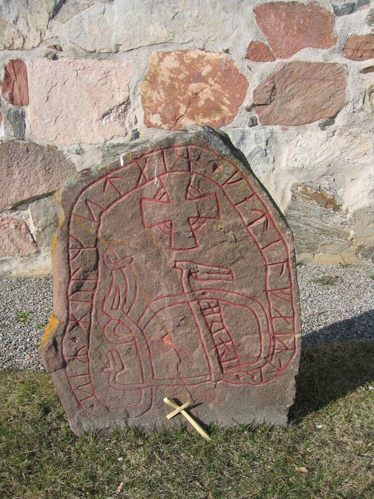 Runstenen U49, Lovö kyrka. U 49 är en av fem runstenar som är uppställda vid Lovö kyrka. De ord man kunnat tyda lyder: "Sigröd (?), Holmsten, Kättilfast lade (?)..." Man förmodar att U50 strax intill fullbordar budskapet.